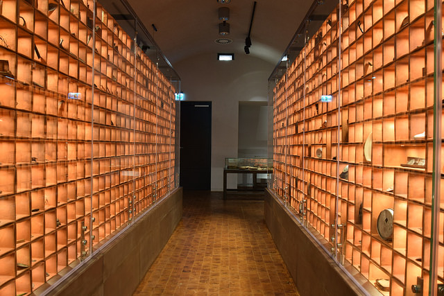 Persönliche Gegenstände der Ermordeten Polen im Katyn-Museum